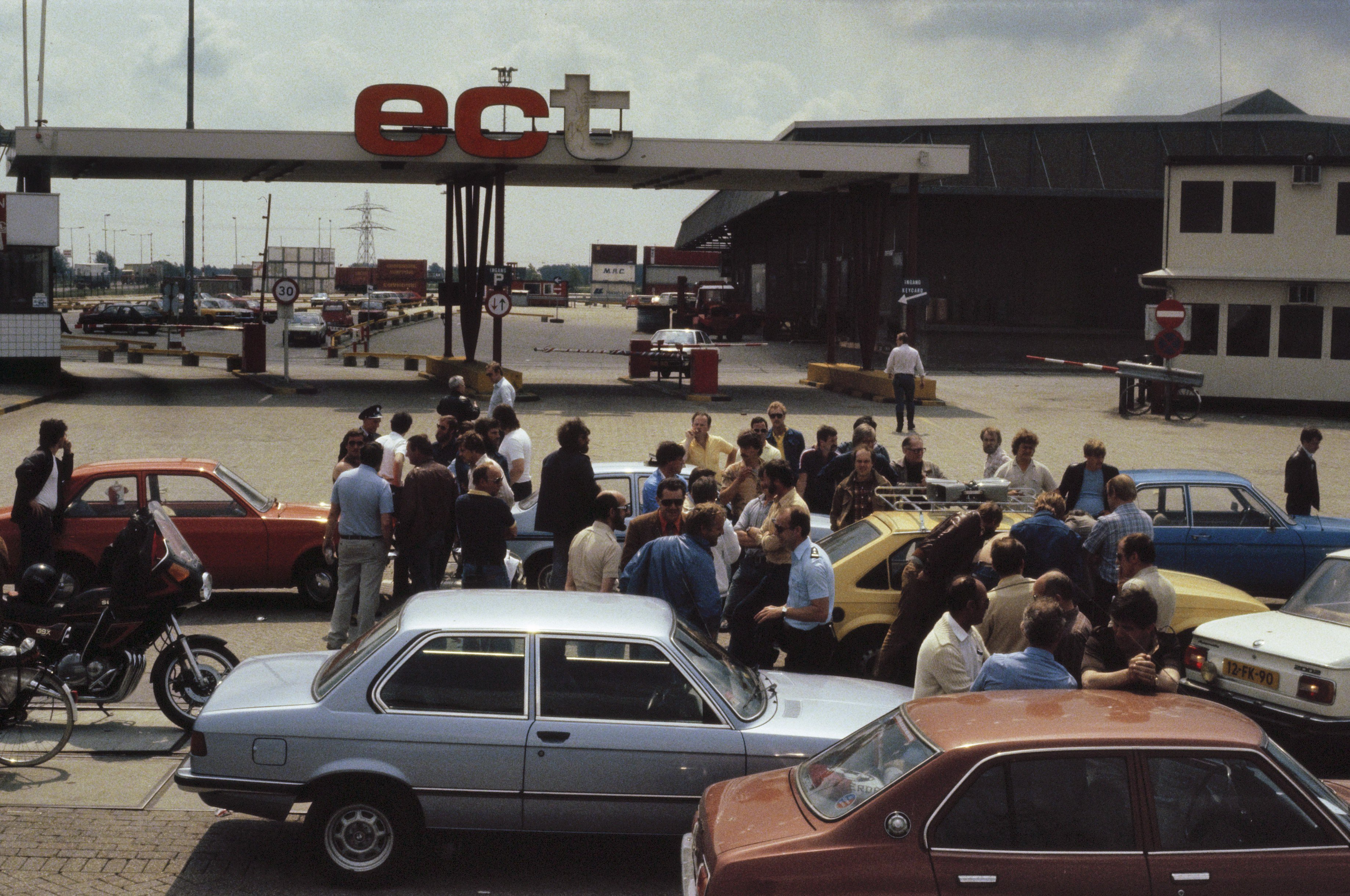 Collectie / Archief : Fotocollectie Anefo Reportage / Serie : [ onbekend ] Beschrijving : Staking Rotterdams havenbedrijf ECT, o.a. blokkade toegangspoorten Datum : 27 mei 1982 Locatie : Rotterdam, Zuid-Holland Trefwoorden : Blokkades, HAVENBEDRIJVEN, Stakingen Instellingsnaam : ECT Fotograaf : Antonisse, Marcel / Anefo Auteursrechthebbende : Nationaal Archief Materiaalsoort : Dia (kleur) Nummer archiefinventaris : bekijk toegang 2.24.01.06 Bestanddeelnummer : 253-8742